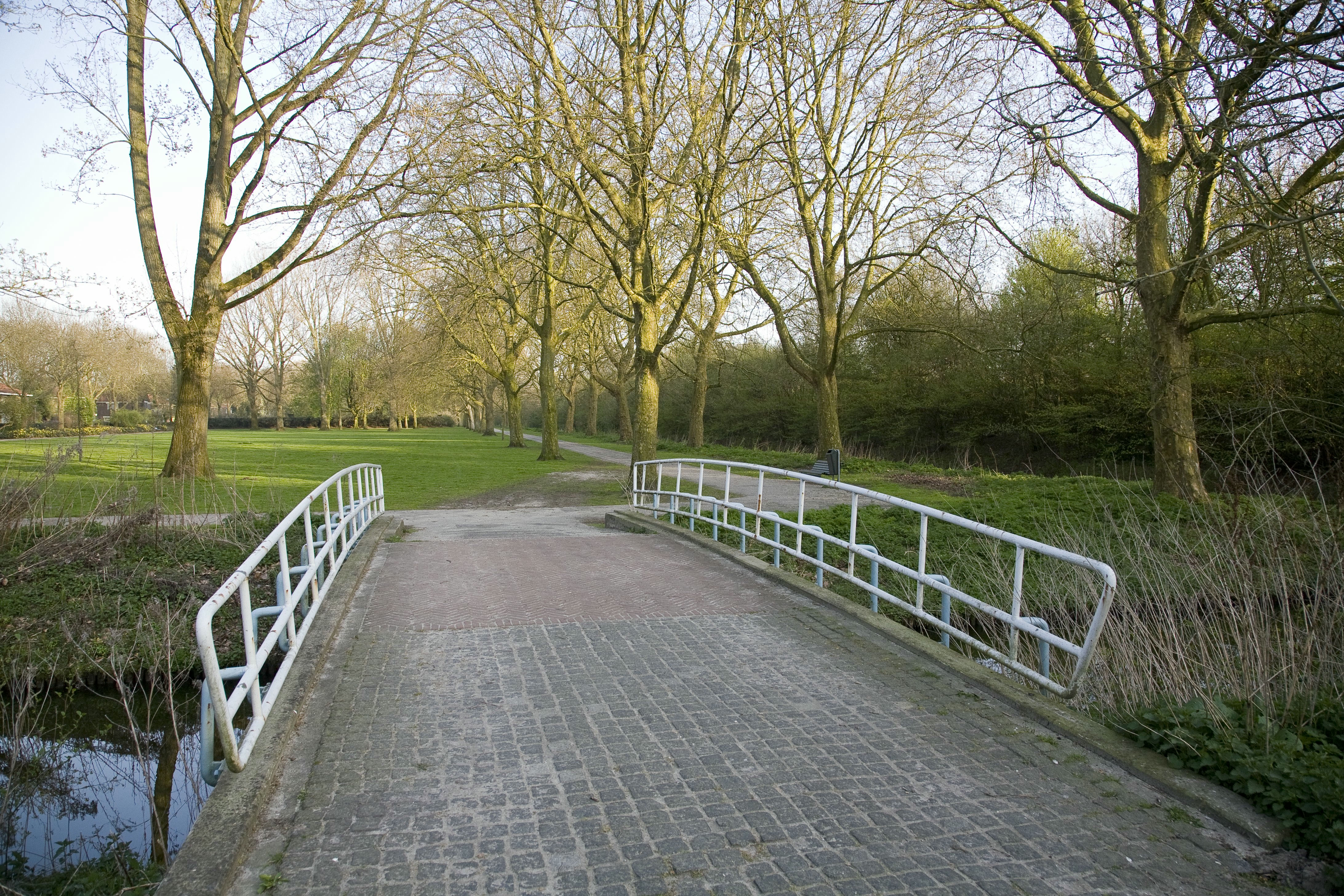 Darwinplantsoen: Overzicht met brug 442